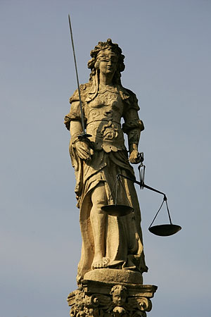 Cudrefin: la fontaine de la justice